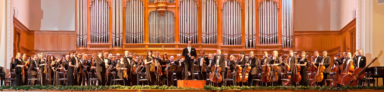 МГАСО п/у Павла Когана ; Moscow State Symphony Orchestra (MSSO) with Pavel Kogan, Music Director & Chief Conductor